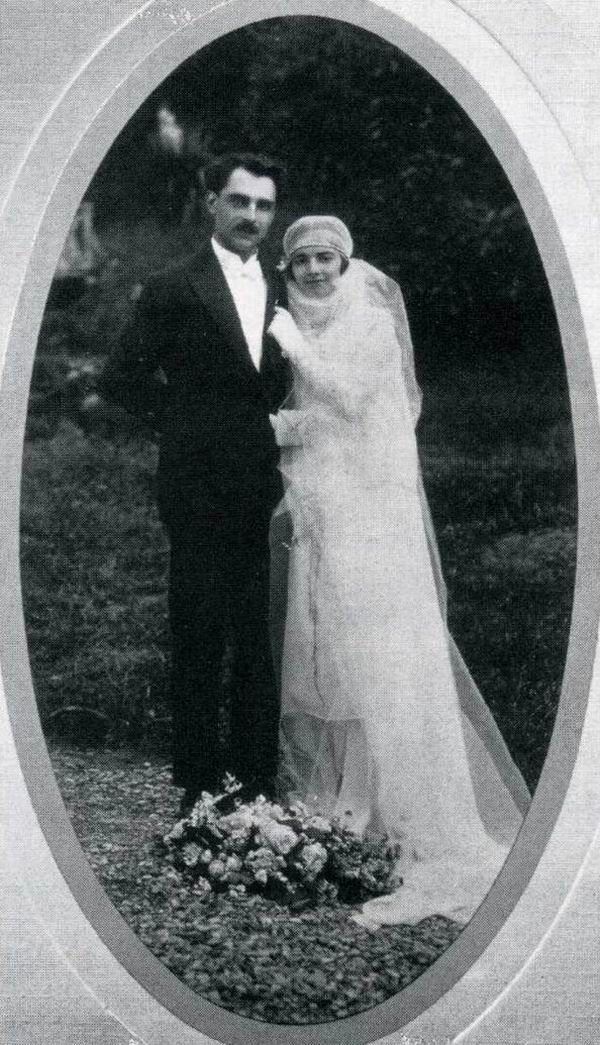 Photo de mariage de Marcel Petiot